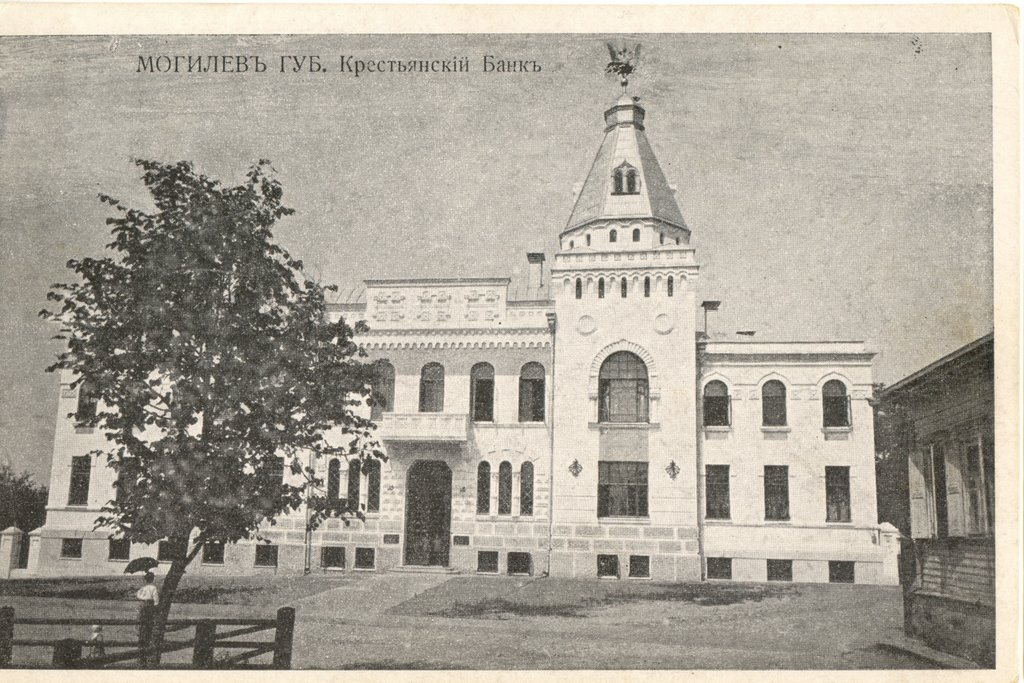 Беларуская (тарашкевіца): Магілёў (Mahiloŭ), вуліца Афіцэрская (vulica Aficerskaja). Пазямельна-сялянскі банк